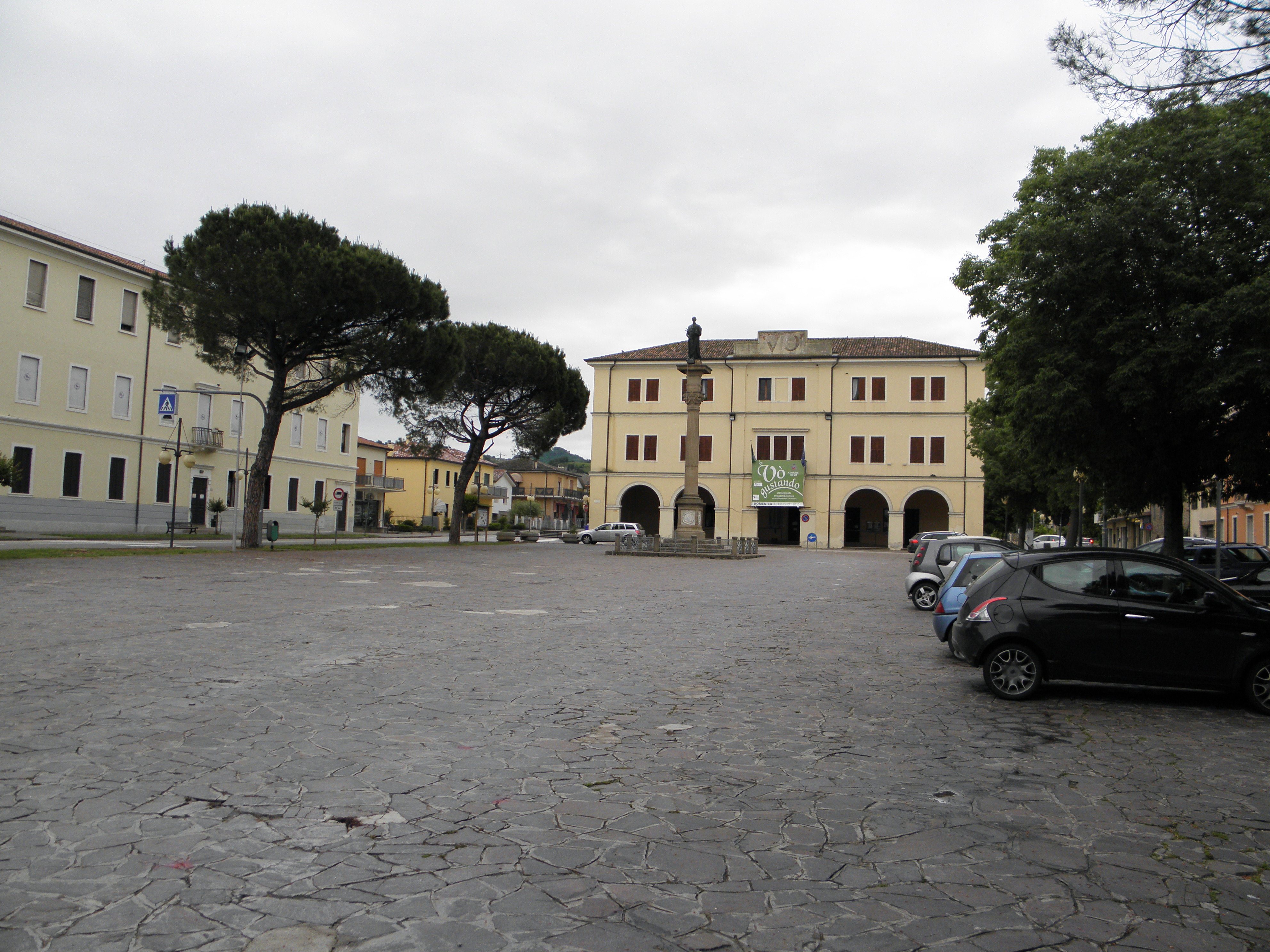 Vo', la centrale Piazza Liberazione con sullo sfondo la palazzina municipale.